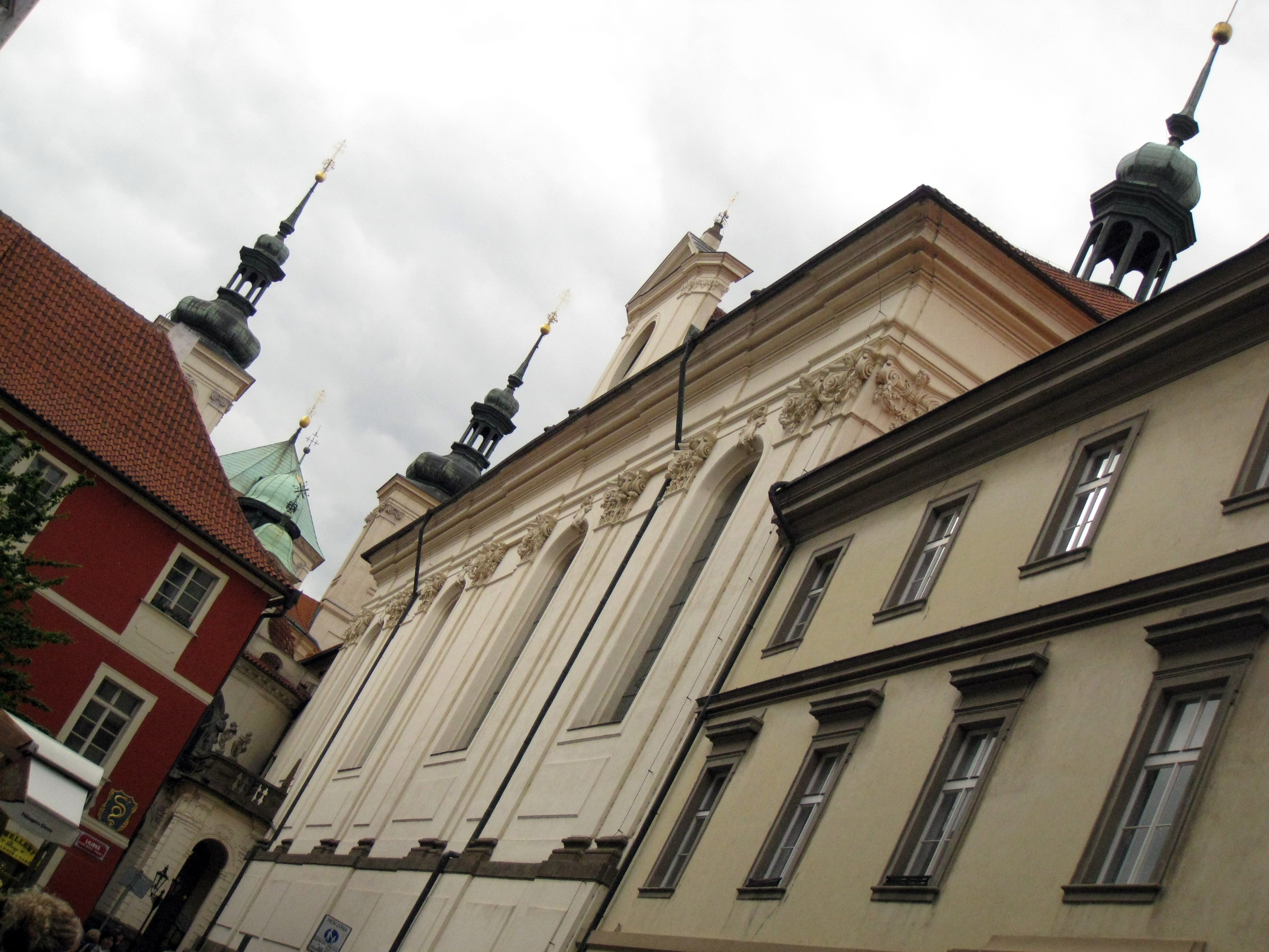 Kolej Klementinum (Staré Město), Praha 1, Křižovnické nám., Karlova 190, Staré Město